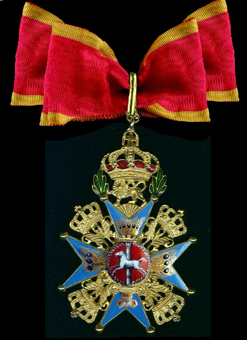 Commandeurskruis aan lint, Particuliere verzameling, Groningen